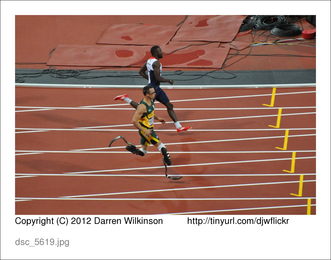 Oscar Pistorius in 400m semi